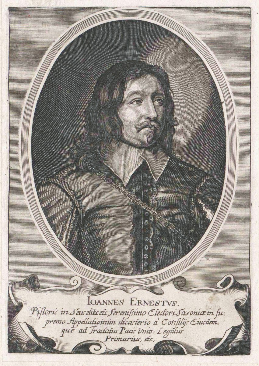 Scan eines Kupferstiches im Bildarchiv Austria